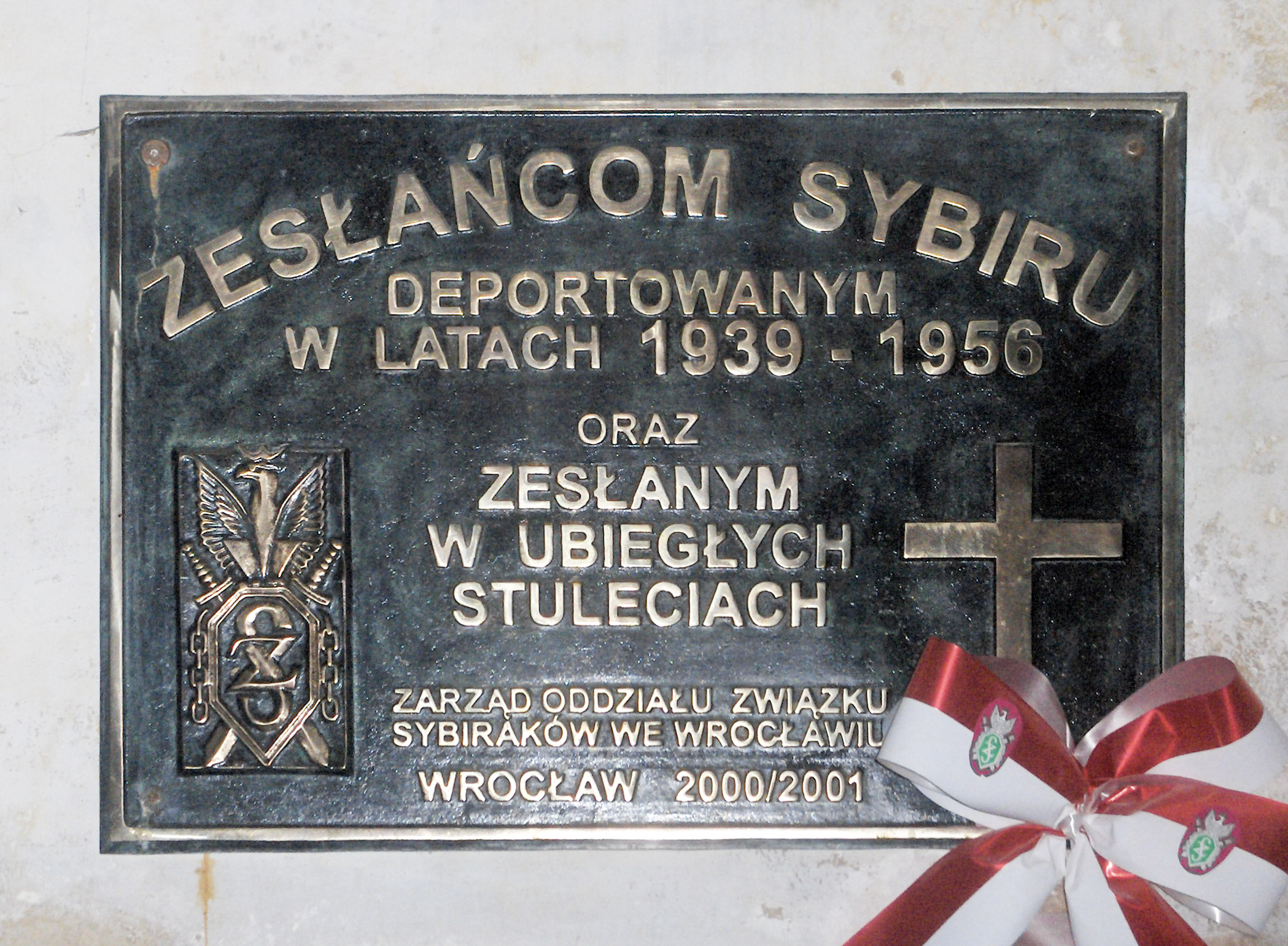 Tablica pamiątkowa w bazylice św. Elżbiety we Wrocławiu, poświęcona Zesłańcom Sybiru w latach 1939-1956 oraz w ubiegłych stuleciach